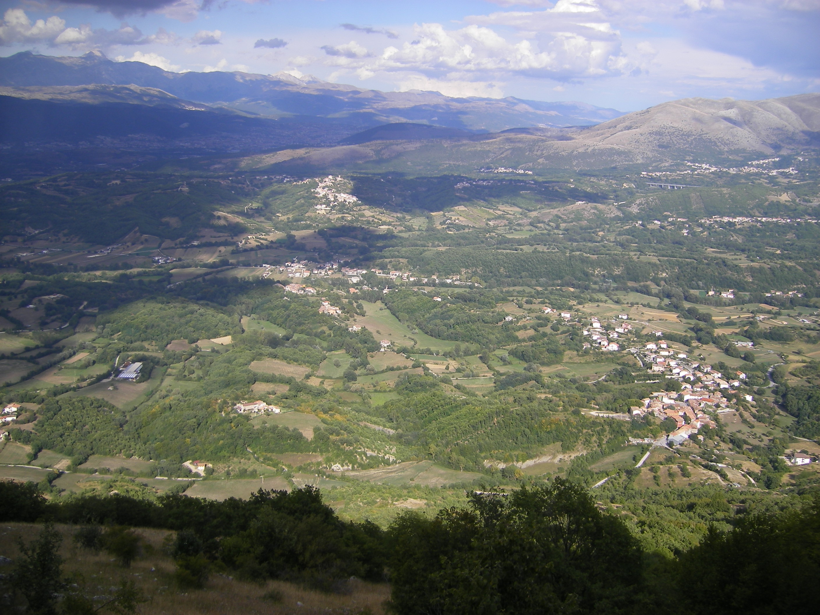 Panorama con la frazione di Pié La Costa(Tornimparte)in basso a destra.